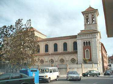 Casa Mare de les Germanes de la Consolació, al barri de Jesús de Tortosa.